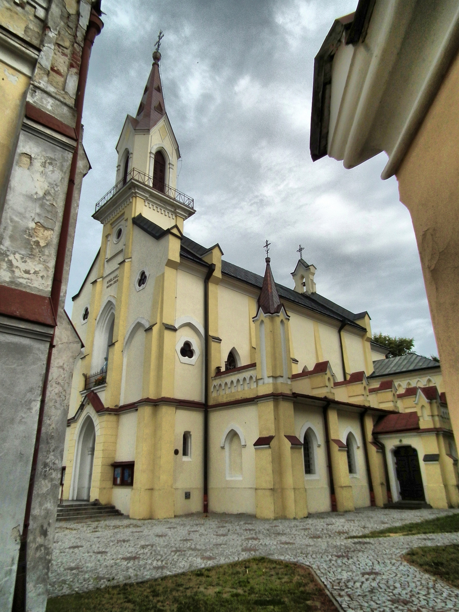 Frampol, kościół par. p.w. Matki Boskiej Szkaplerznej i św. Jana Nepomucena, 1873-1878, 1906